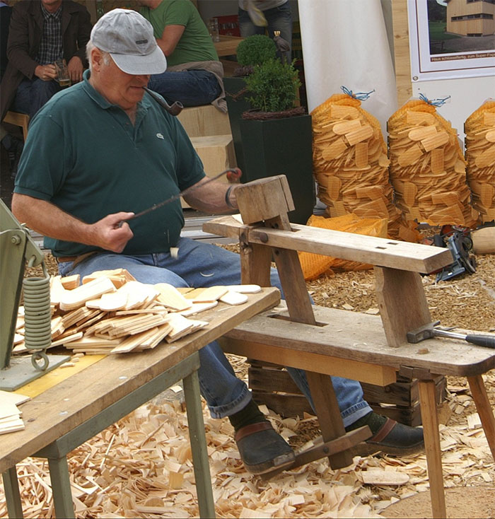 Boarisch: Schindlmåcha auf ana Hõazlbéng im Bregenza Wåid